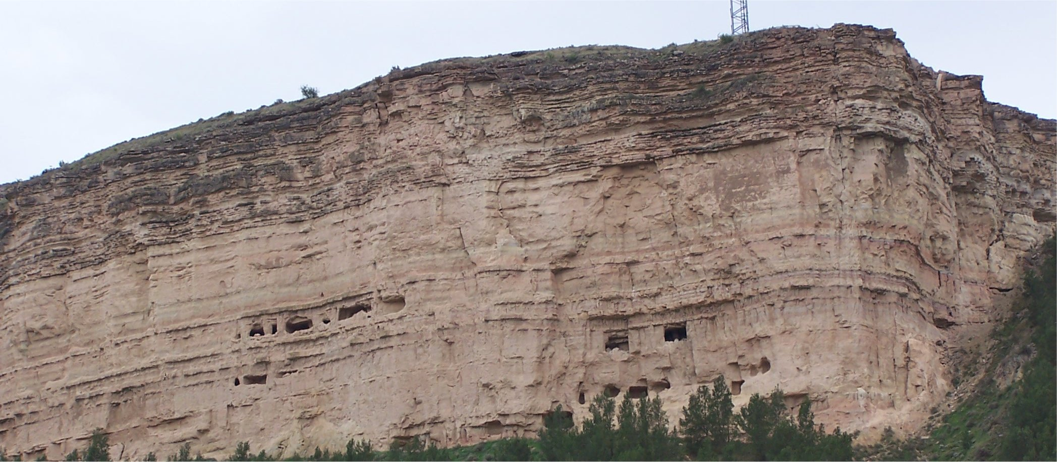 Eigen werk 17 april 2006